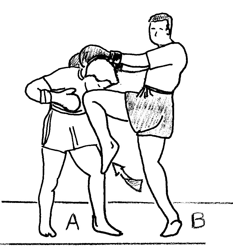 genou_remontant5.jpg